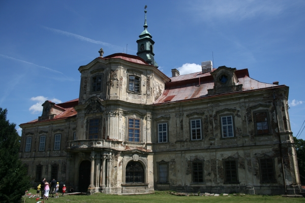 Zámek Trpísty z let 1723-1729 v okrese Tachov, Plzeňský kraj, Česká republika